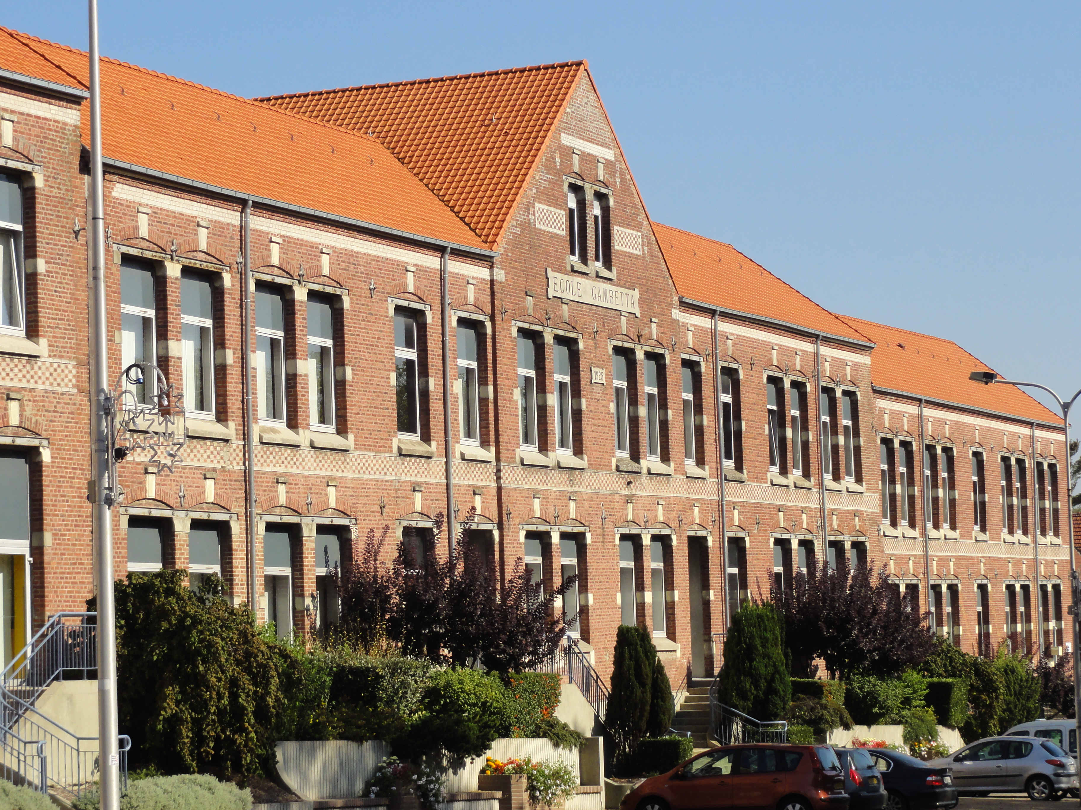 Écoles des cités des fosses nos 2 et 2 bis - 2 ter de la Compagnie des mines de Marles dans le bassin minier du Nord-Pas-de-Calais, Marles-les-Mines, Pas-de-Calais, Nord-Pas-de-Calais, France.